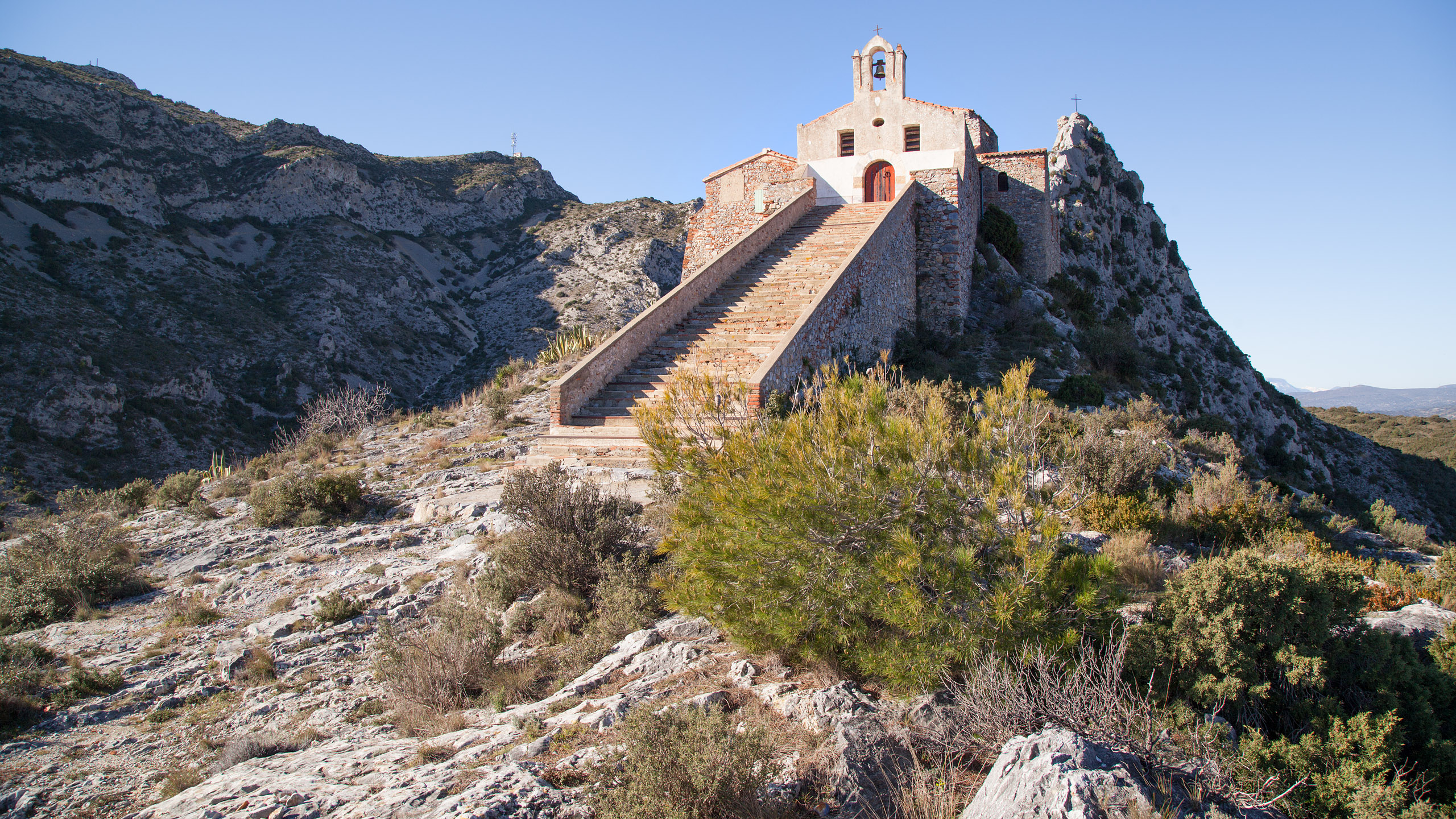 Escalier